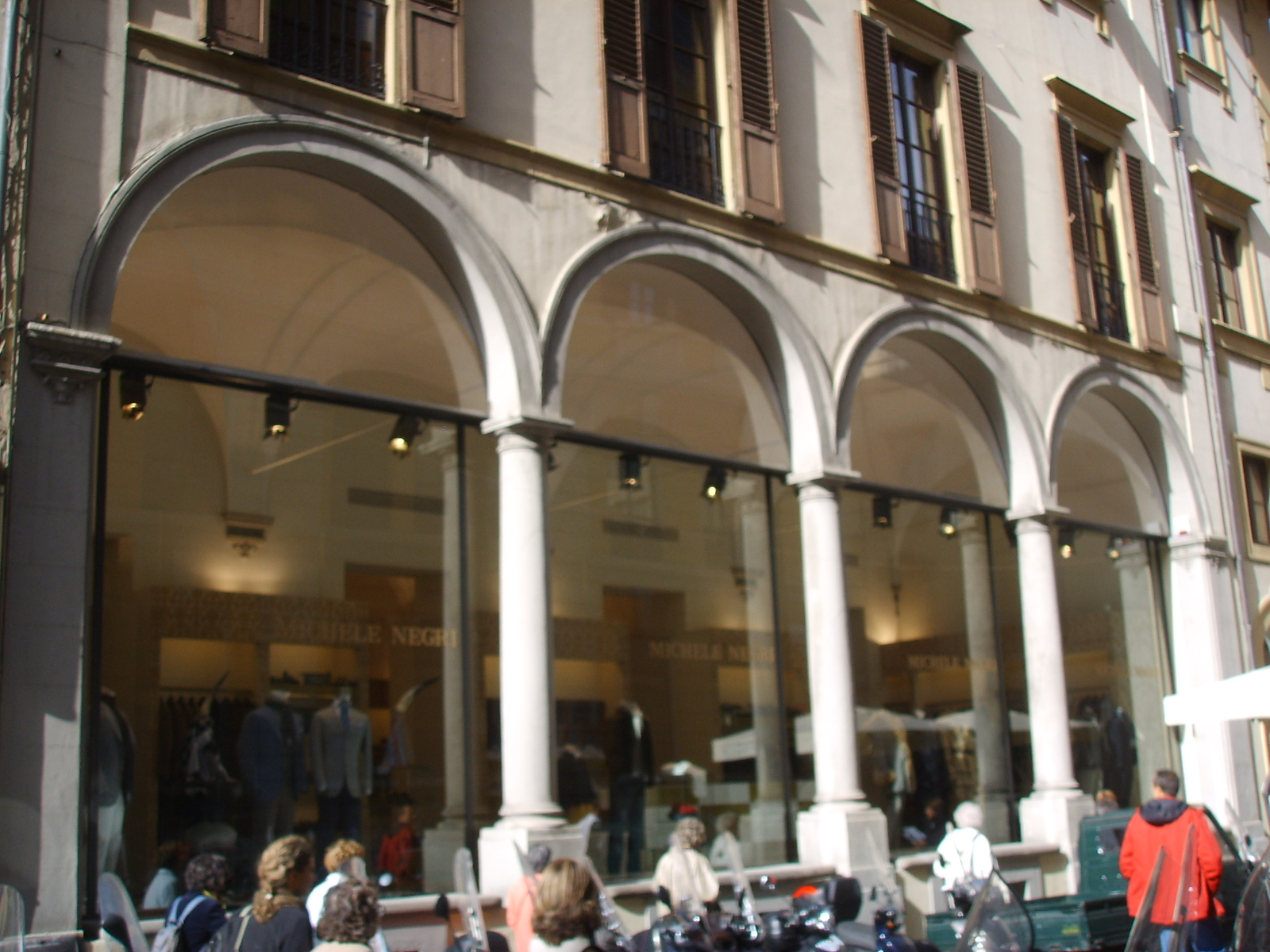 Loggia di san gaetano